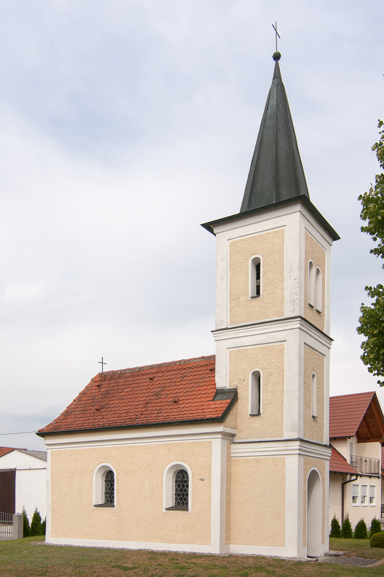 Kapelle; 2. Hälfte 19. JahrhundertThis is a photograph of an architectural monument.